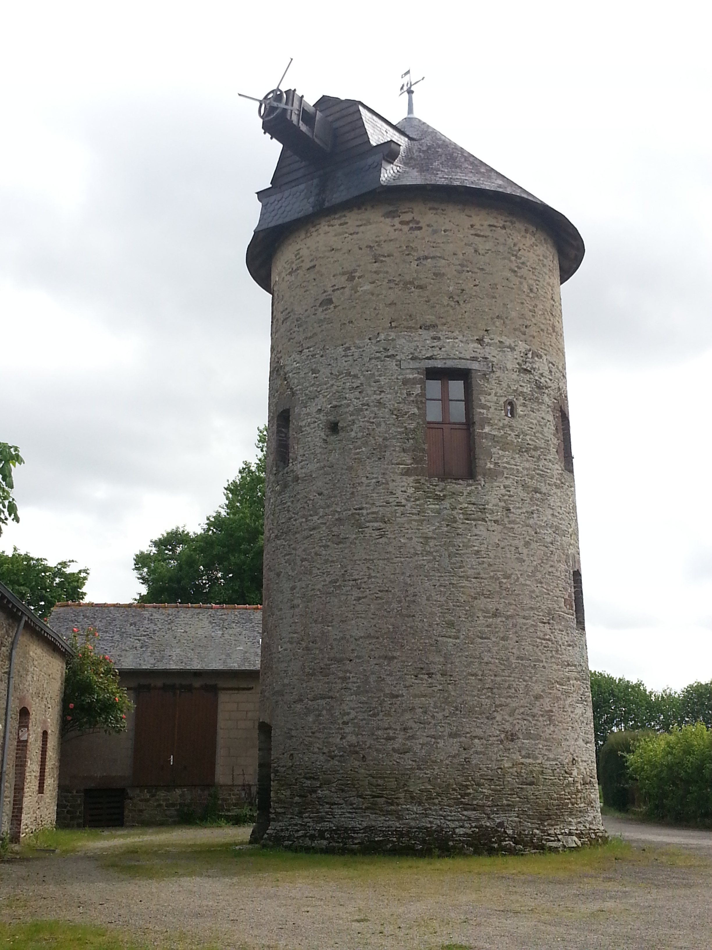 Vue extérieure du moulin